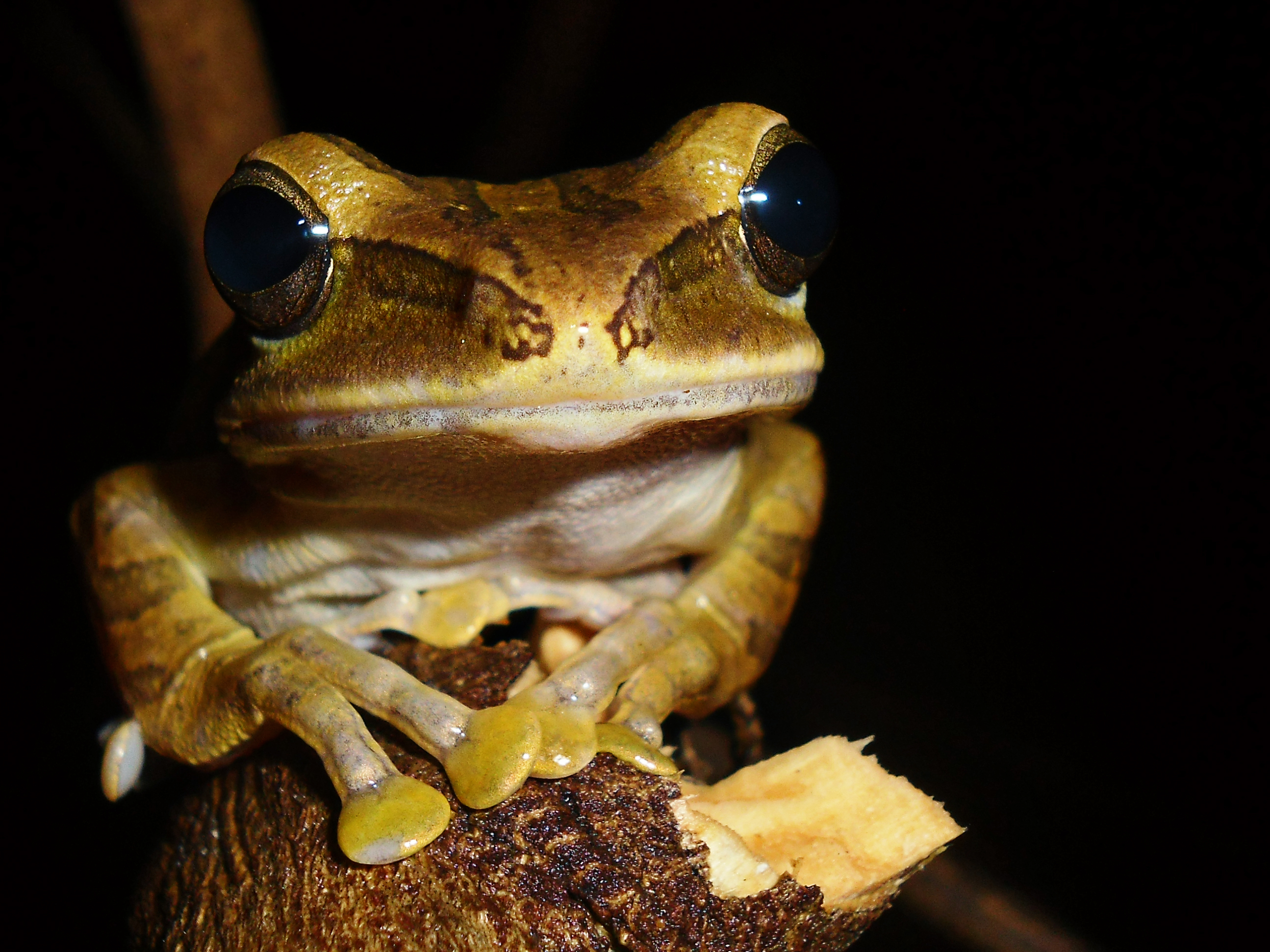 Seekor katak pohon biasa (Polypedates leucomystax) bertengger di sebuah ranting pohon di Kampus IPB Dramaga, Bogor